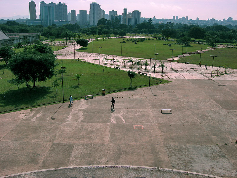 Praça do Relógio, na Cidade Universitária da USP